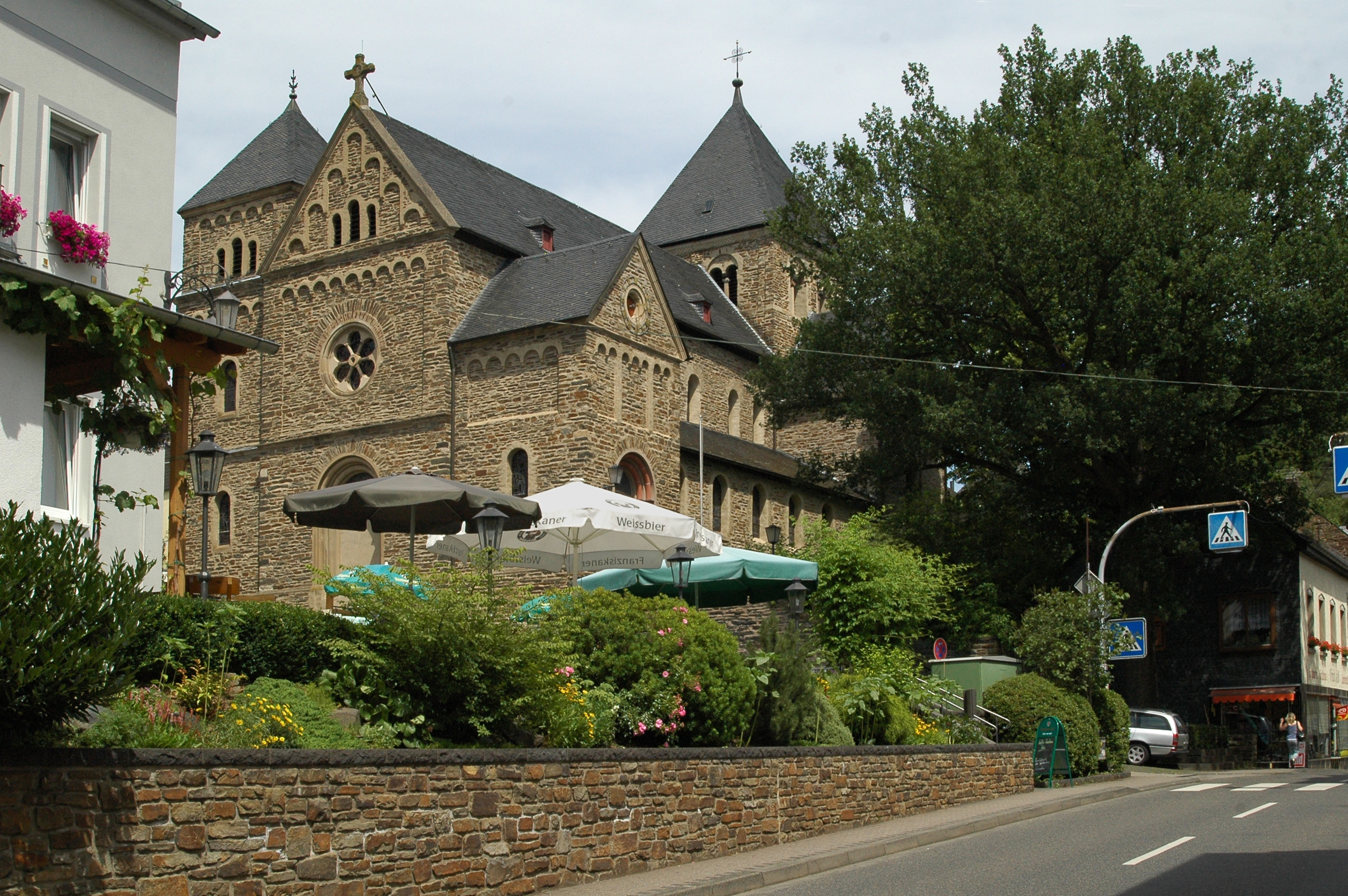 Altenahr, Kirche, Rheinland-Pflalz, Ahr